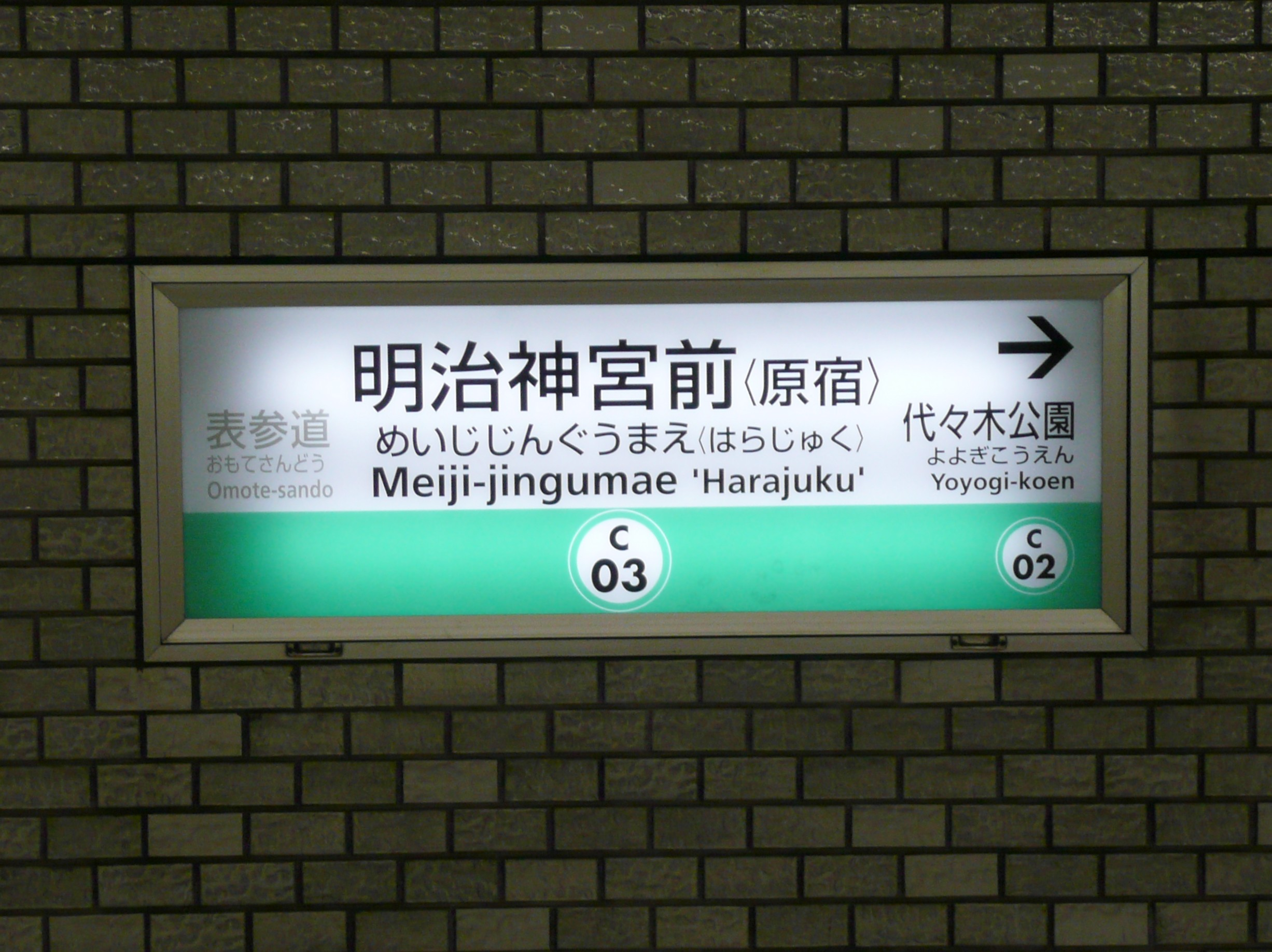 明治神宮前駅駅名標